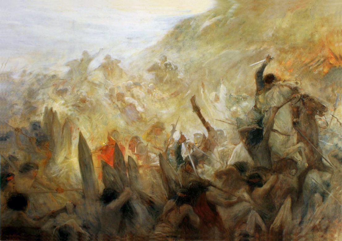 Epopeya de Chile. Oleo sobre tela de 84x117 cms (ca. 1904).